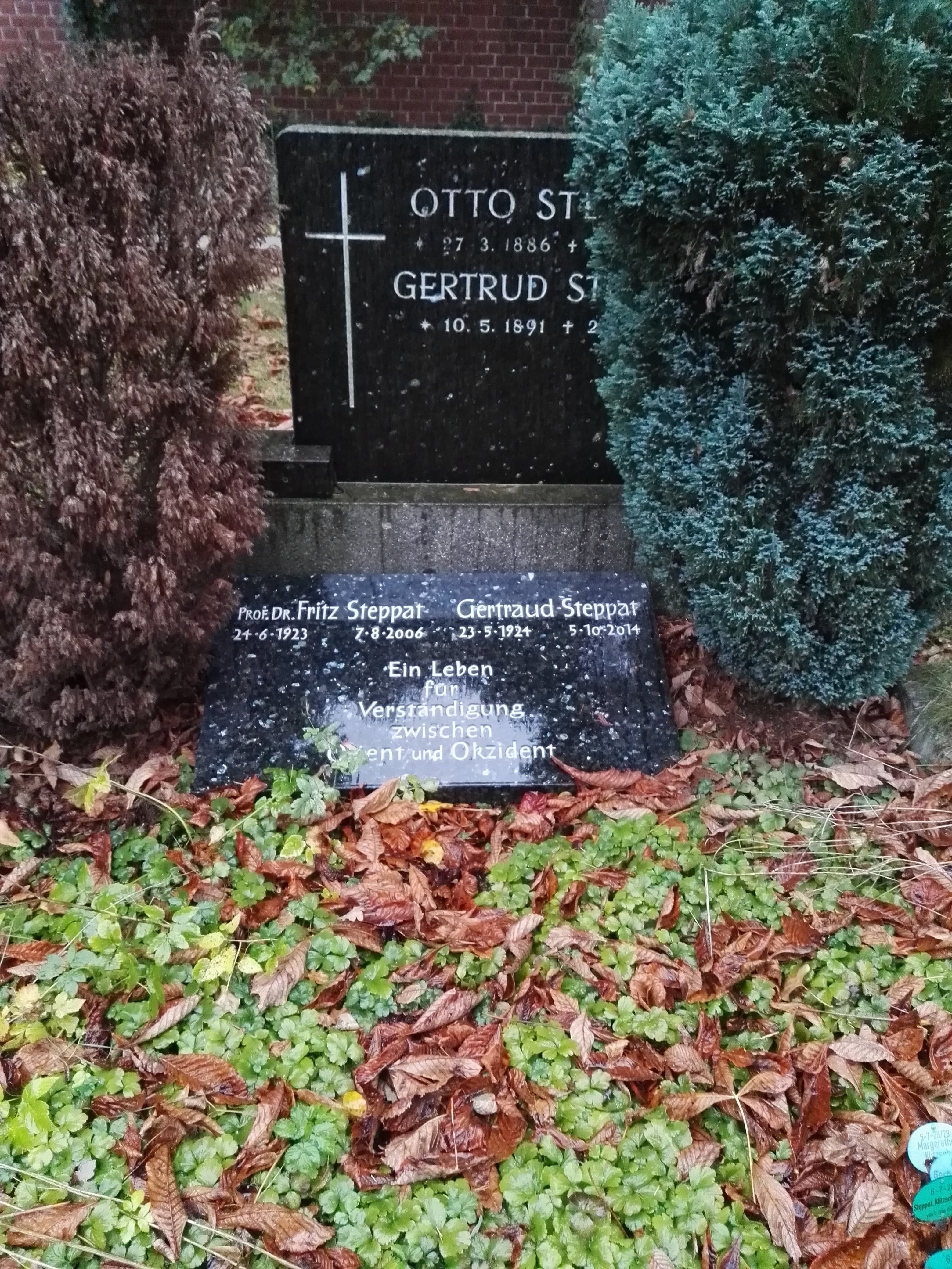 Grab von Prof. Dr. Fritz Steppat auf dem Dom-Friedhof II in Berlin-Mitte